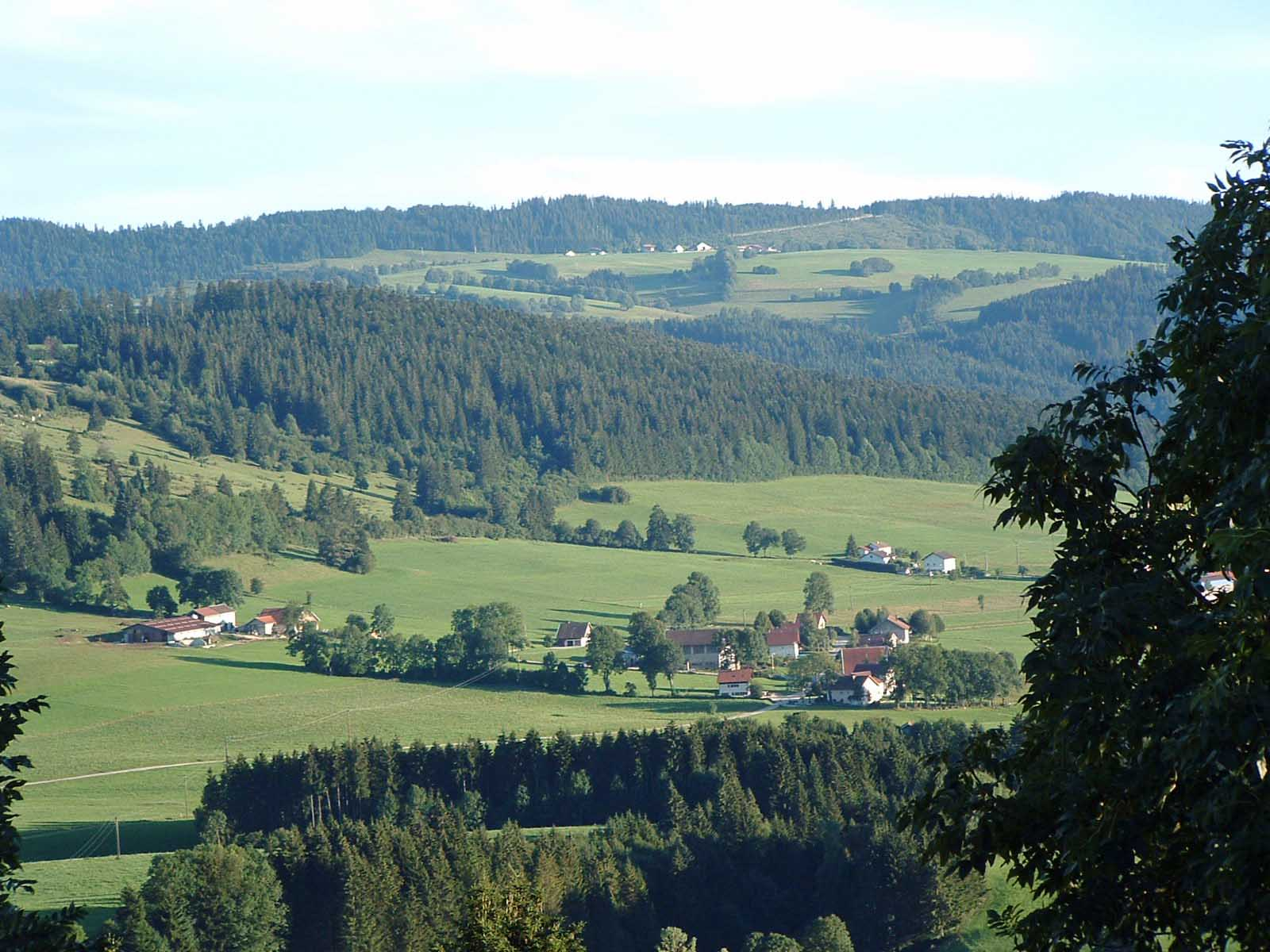 Hameau des Chézières dépendant de la commune des Fins, Doubs, France